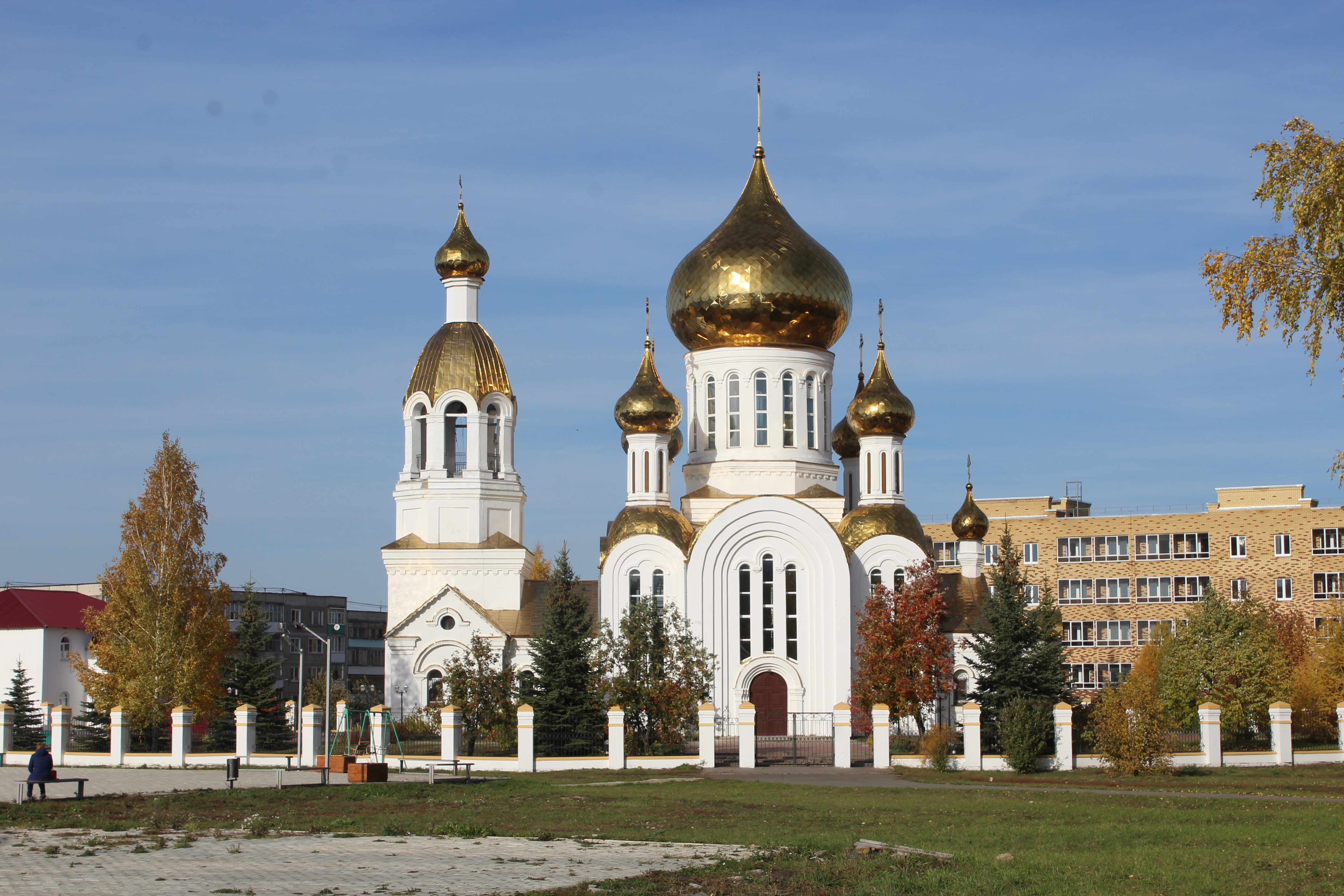 Собор в посёлке Комсомольский